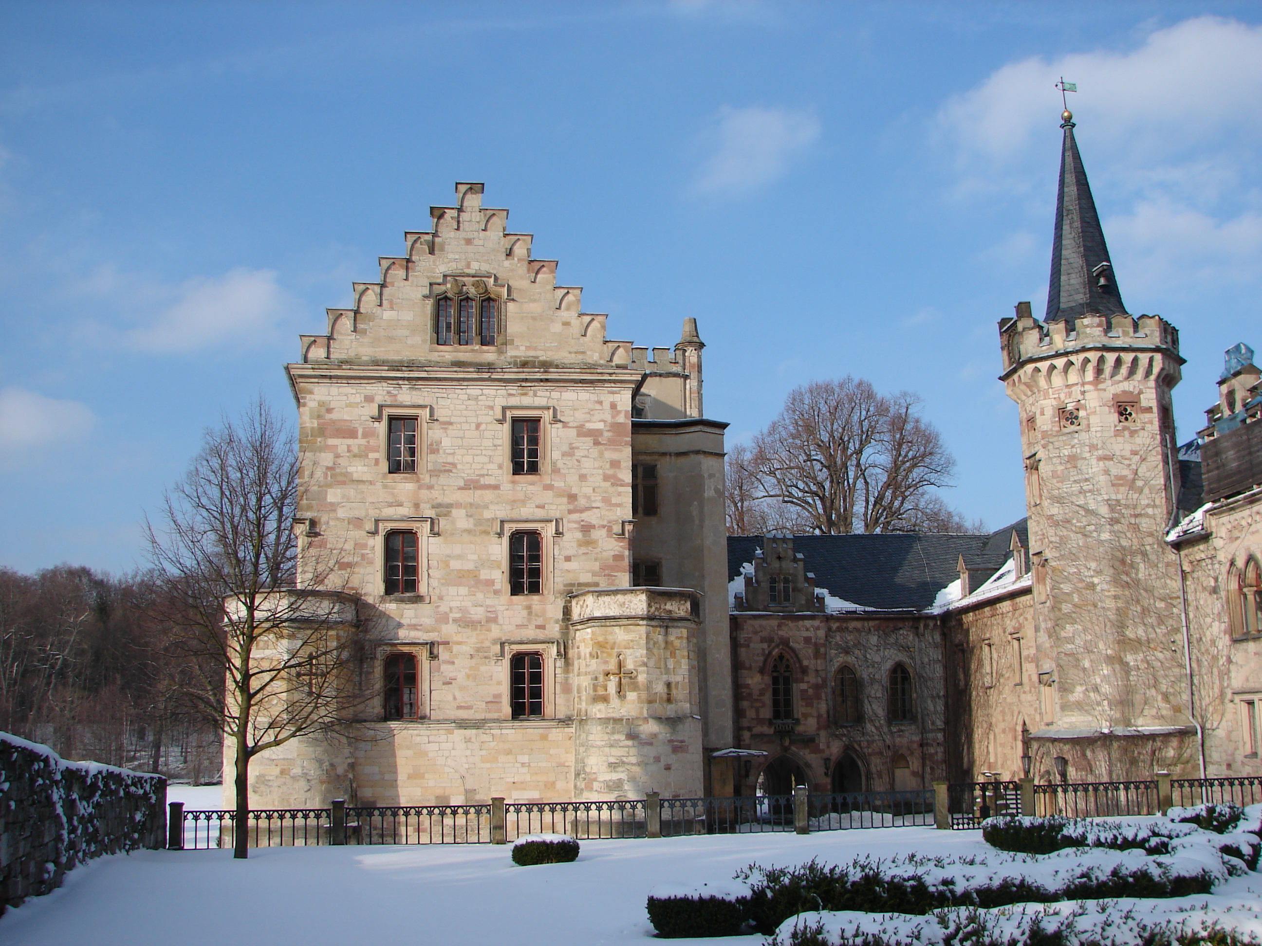 Das Schloss von Reinhardsbrunn im Winter